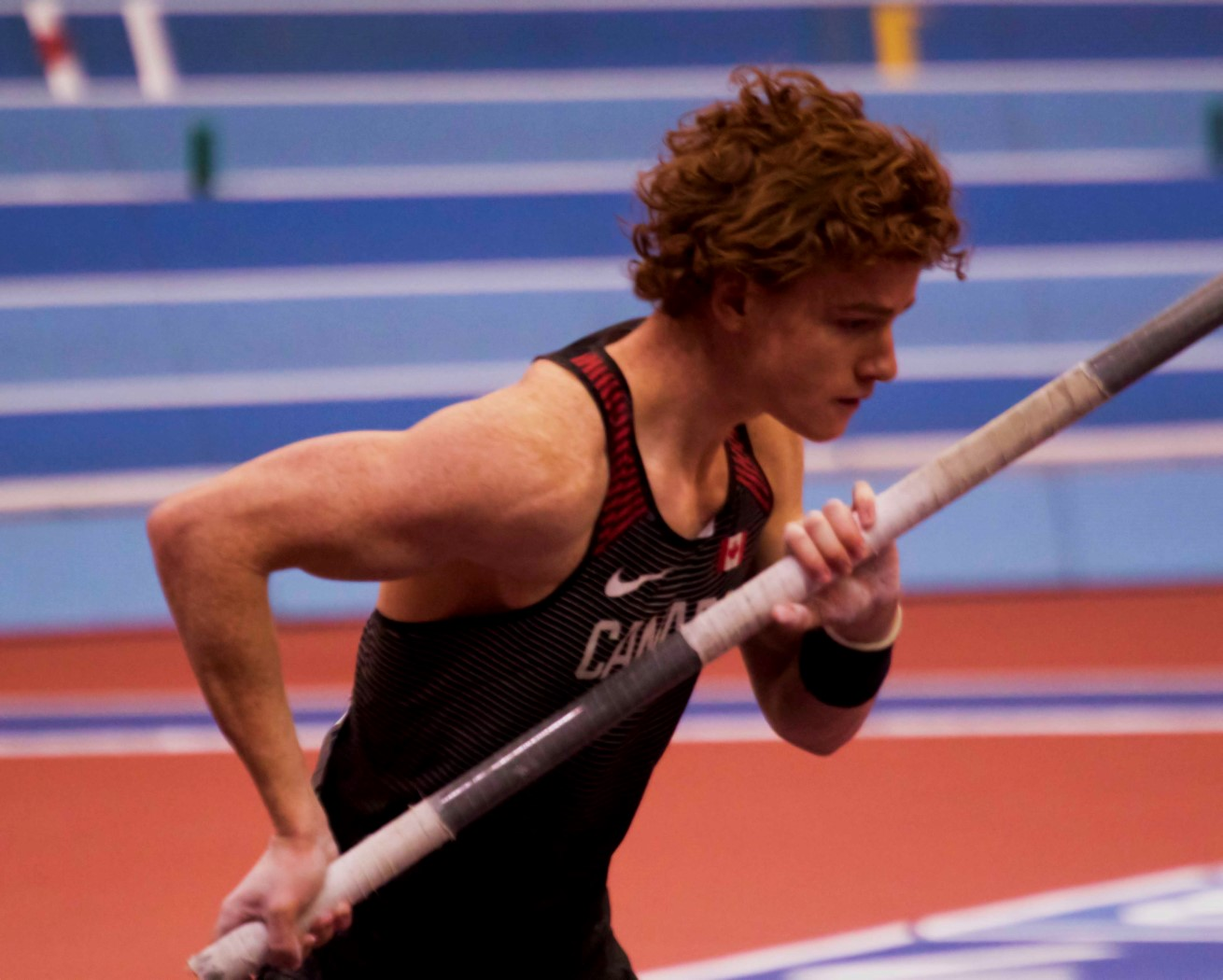 WK040044 polsstok barber